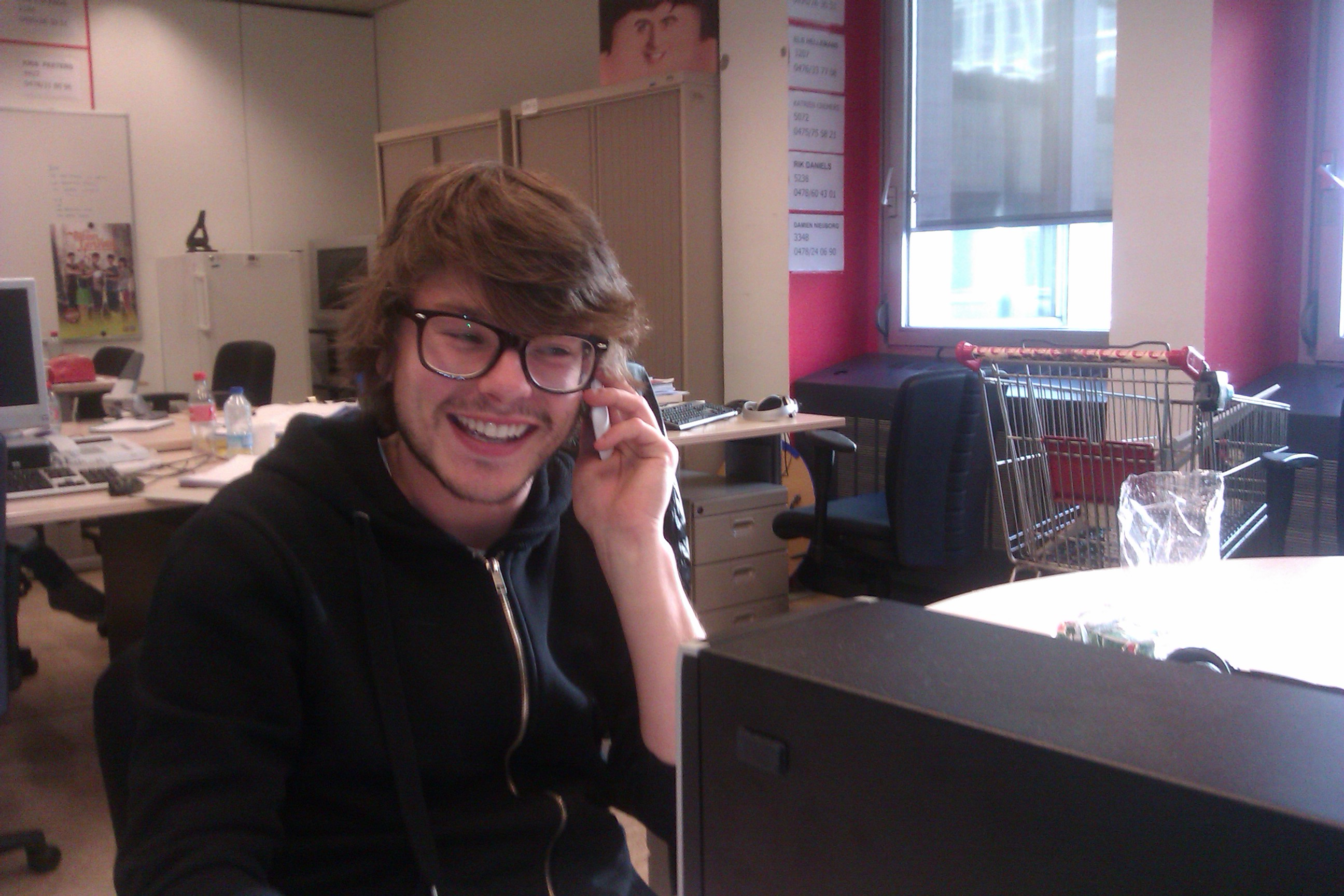 Jelle Jacobs